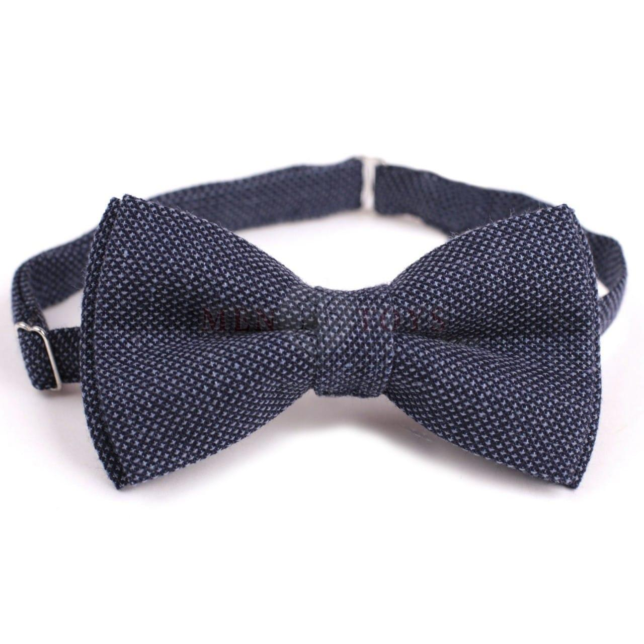 Предварительно завязанная галстук-бабочка